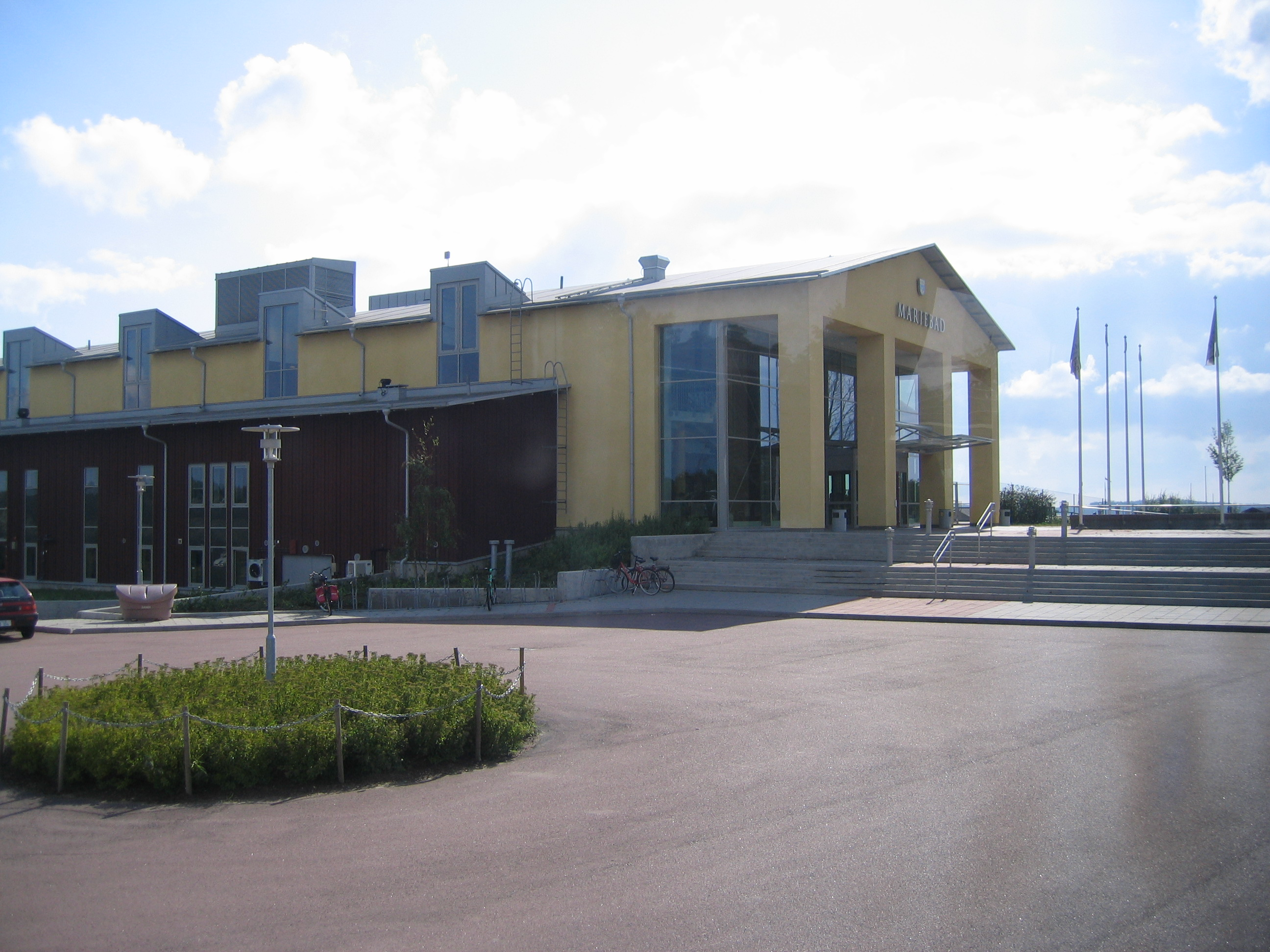 Mariebad, kylpylä Ahvenanmaalla